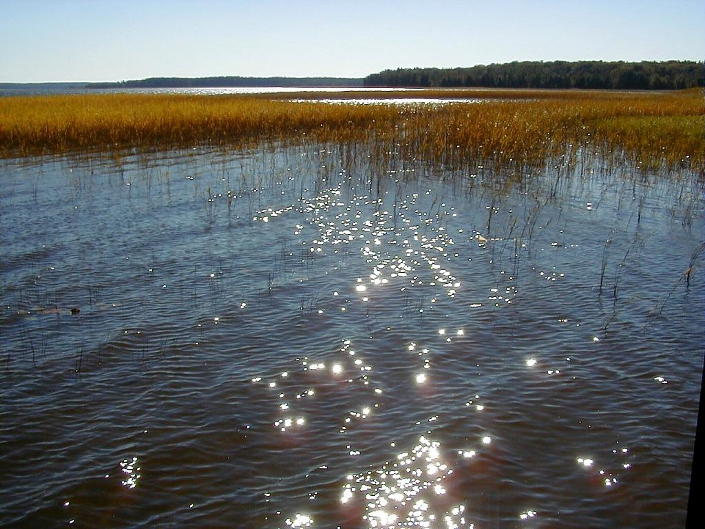 Usmas ezers pie Usmas 2000-09-17